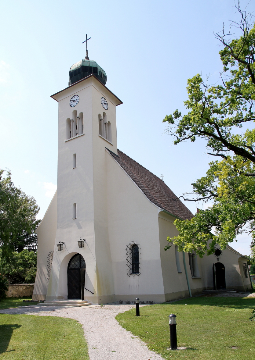 Die kath. Filialkirche zur Kreuzerhöhung in Landegg, ein Ortsteil der niederösterreichischen Marktgemeinde Pottendorf.